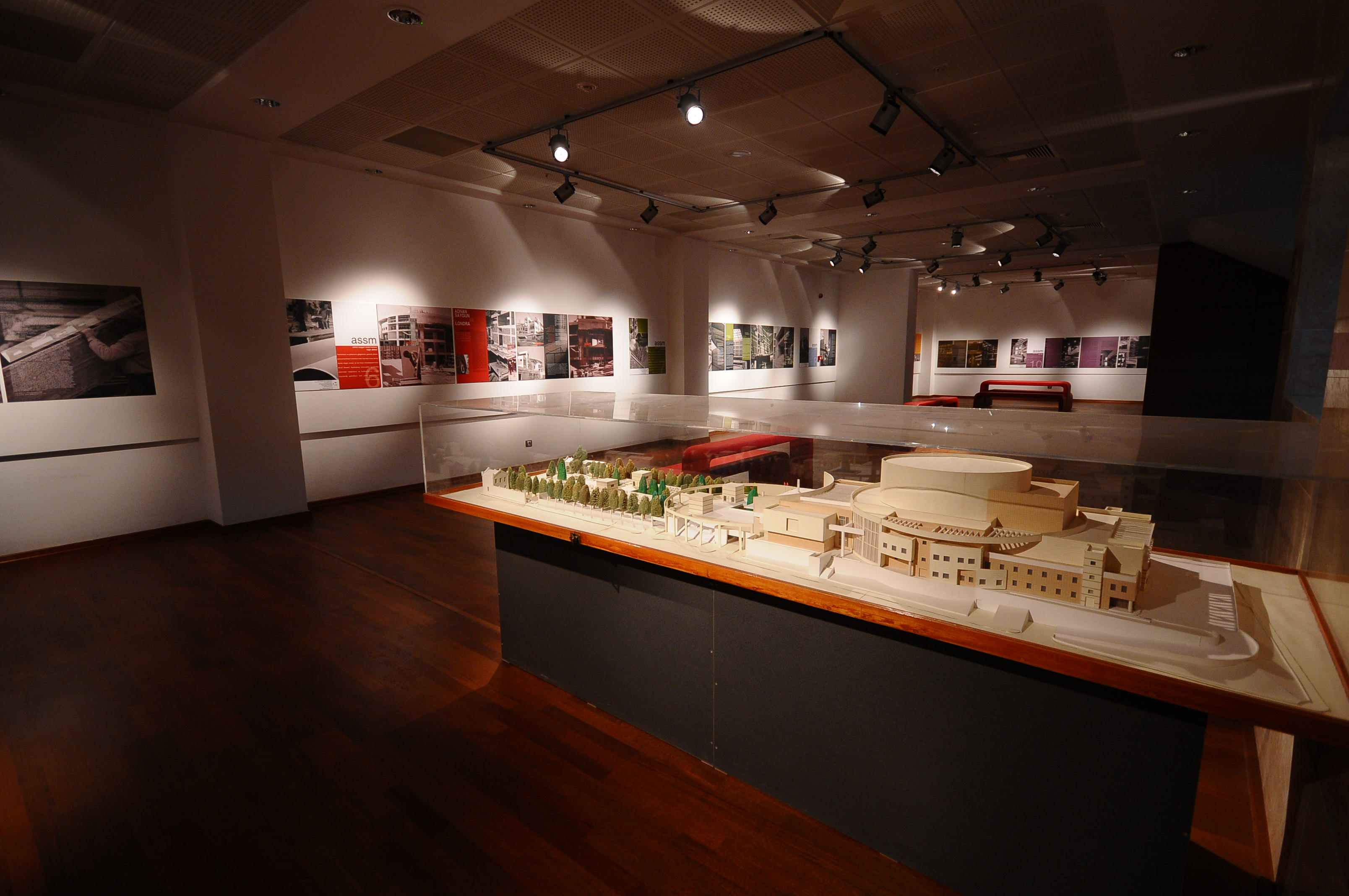 model of the Ahmed adnan saygun arts center at the basement art gallery.